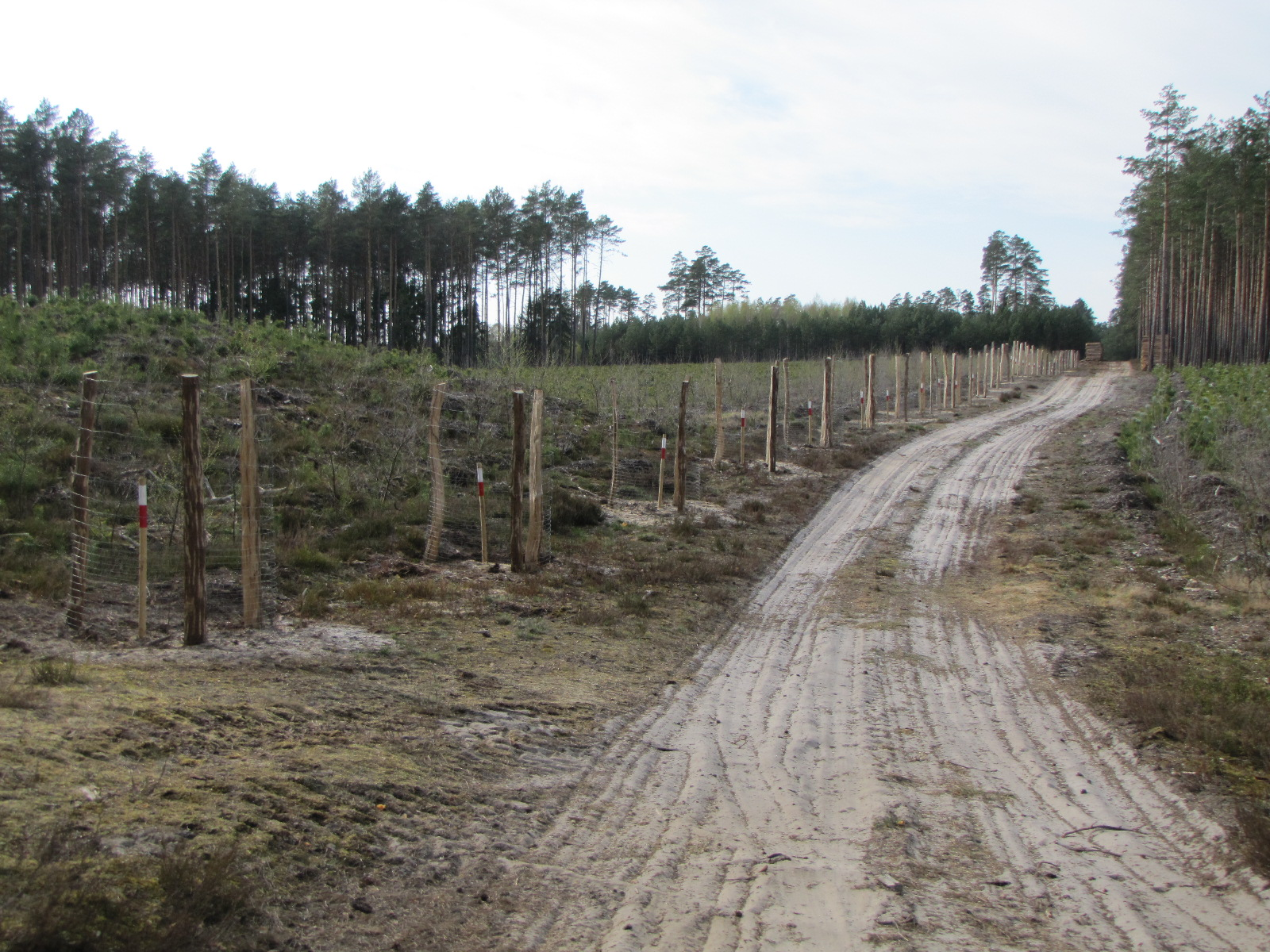 Aleja lipowa zasadzona w miejscu dawnej granicy polsko-niemieckiej w 2018 r. na pamiątkę setnej rocznicy odzyskania niepodległości z inicjatywy Polskiego Towarzystwa Leśnego.